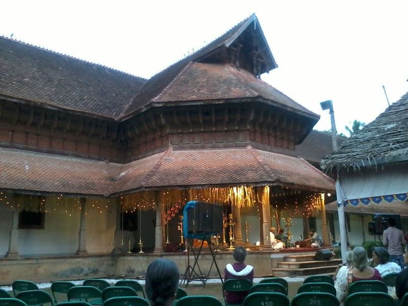 സ്വതിസംഗീതോത്സവം നടക്കുന്ന കുതിരമാളിക